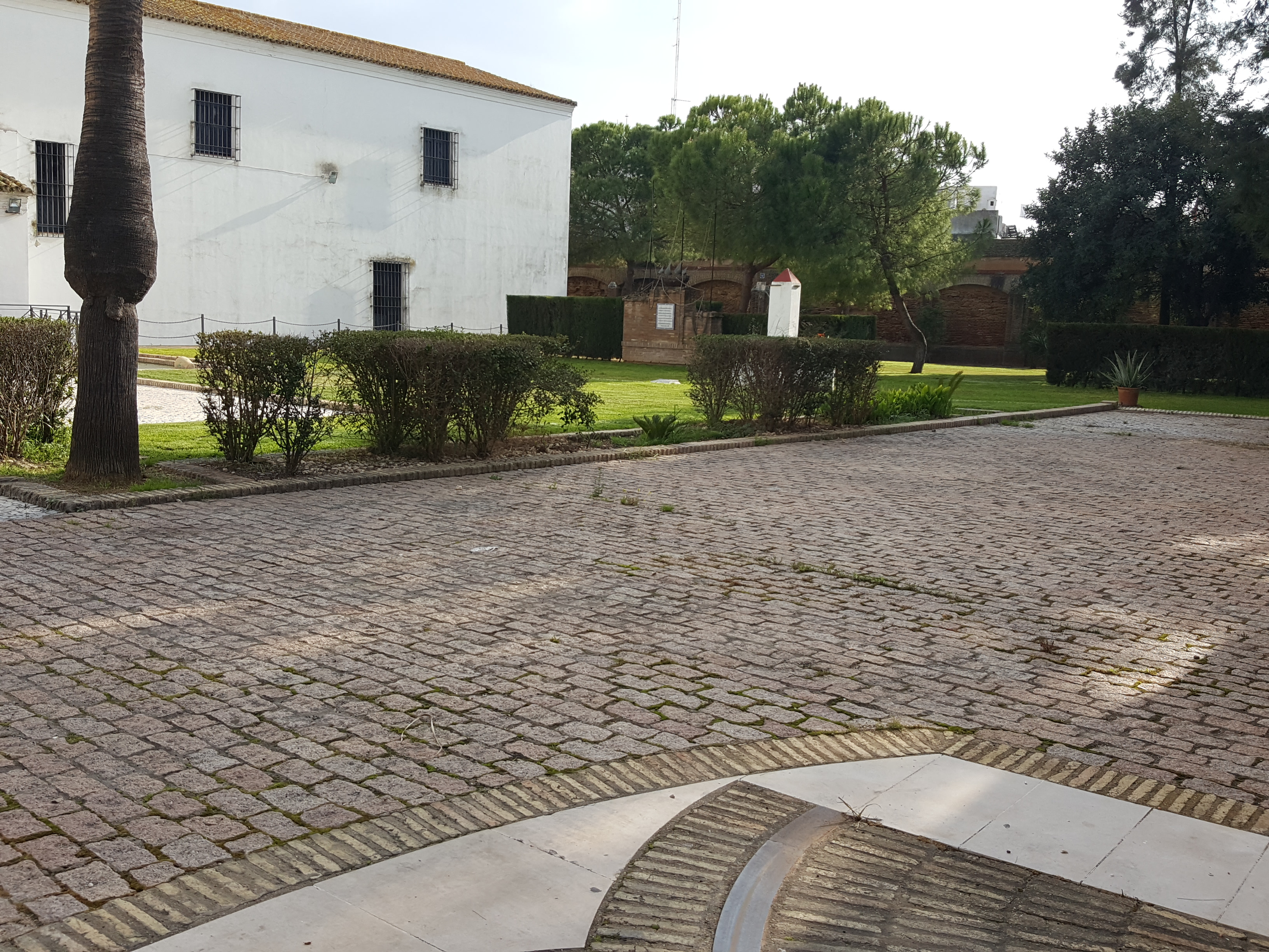 Monasterio de Santa Clara de Moguer. Huertos.